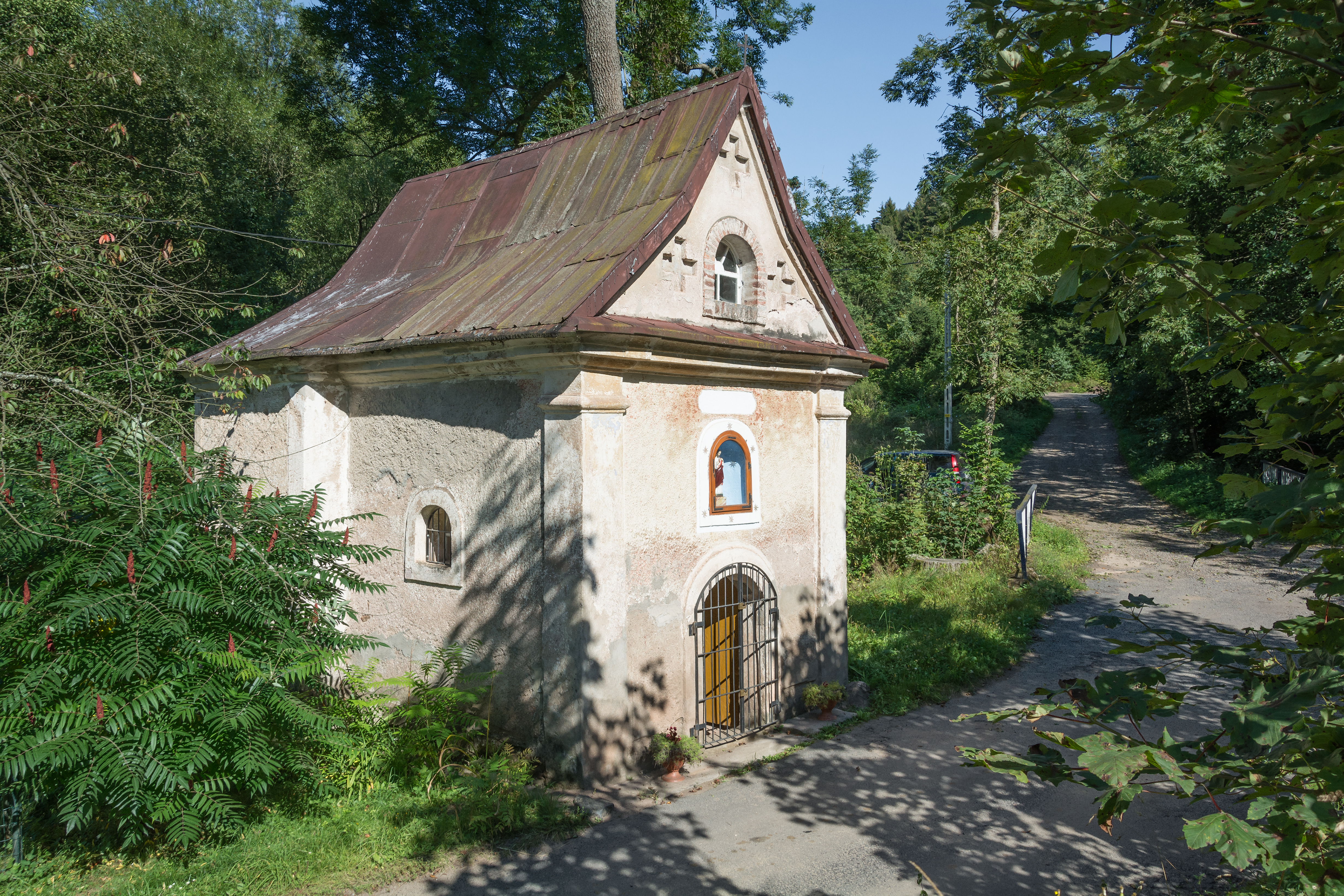 Jawornica, kaplica, 1714